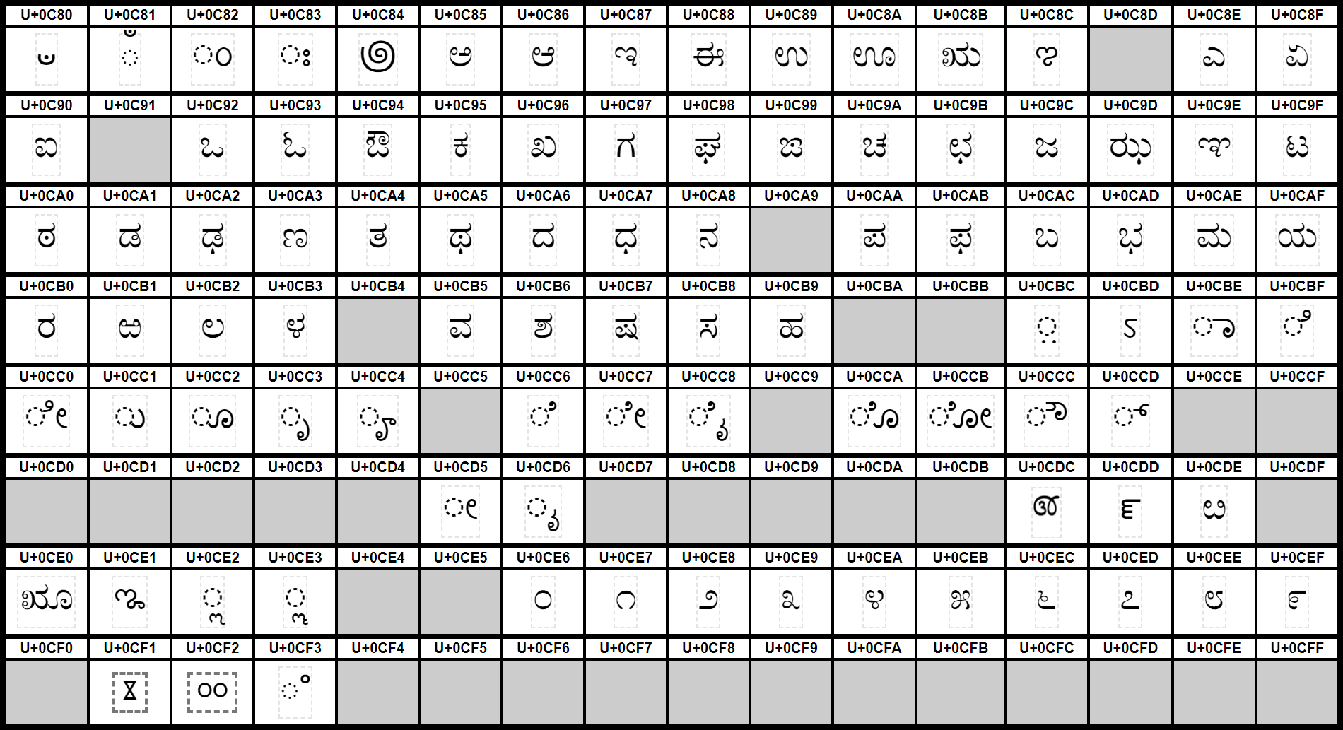 Grafiktafel für den Unicodeblock Kannada. Schraffierte Felder sind unbesetzte Codepoints.